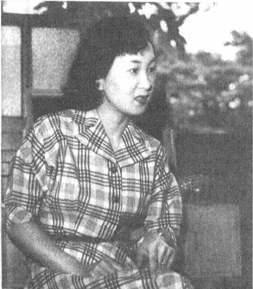 読売新聞社『家庭よみうり』387号（1954年）より藤沢嵐子